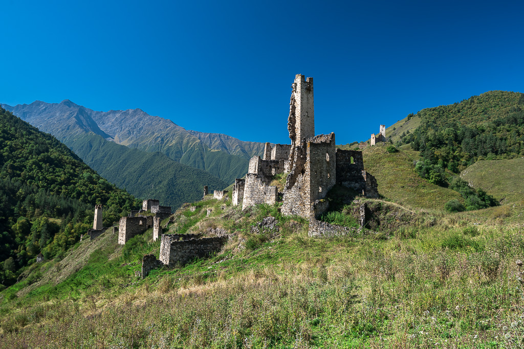 Башенный комплекс в древнем ингушском городе Цори (Джейрахский район, Ингушетия)